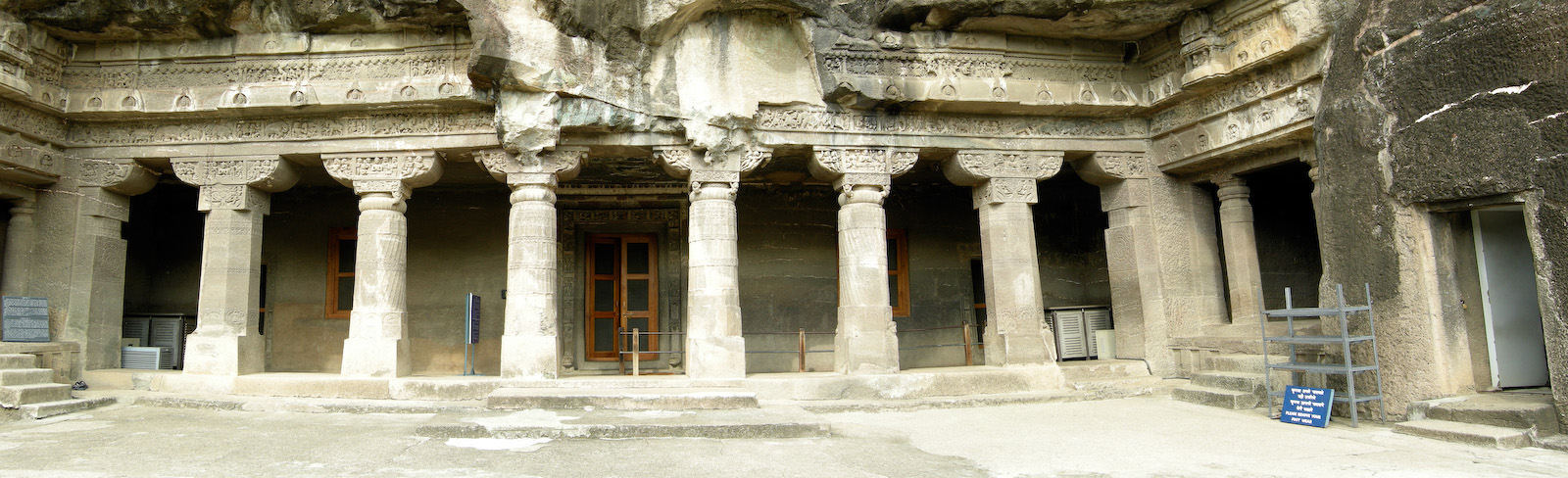 Ajanta Hoehle 1 Veranda mit Hofzellen Digitales Panorama